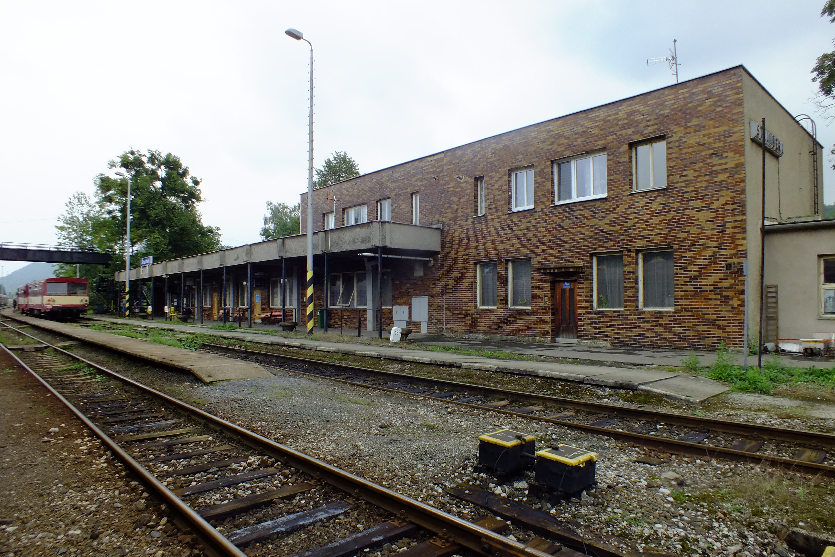 Staniční budova